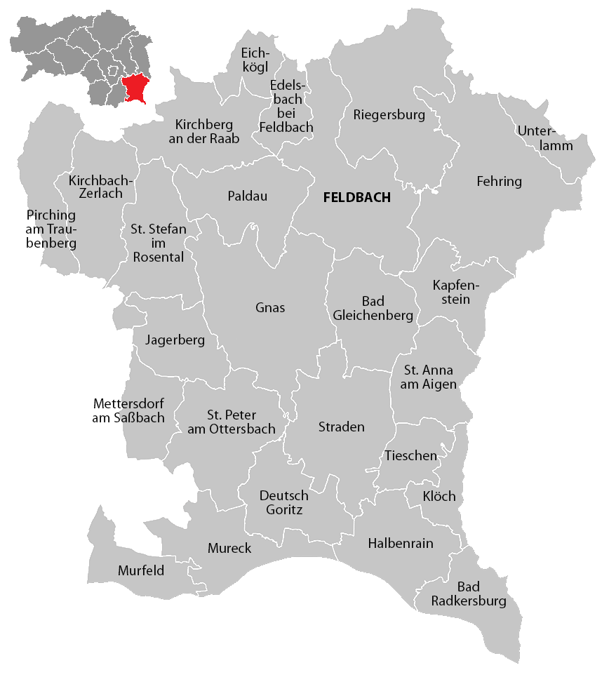 Gemeinden im Bezirk Südoststeiermark (Steiermark), Stand: 1. Januar 2015